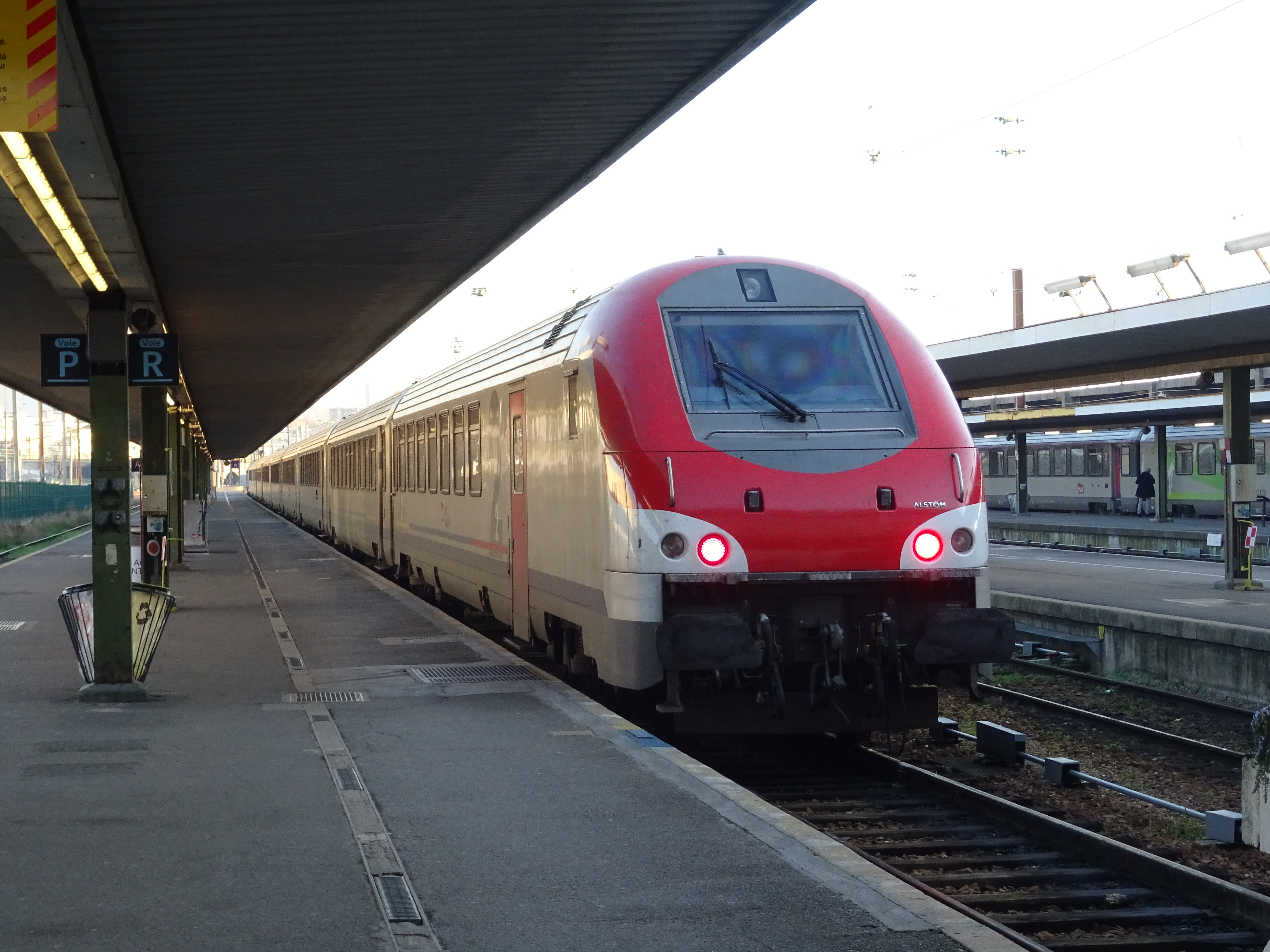 Voiture-pilote Corail VU à quai en gare de Paris-Bercy-Bourgogne-Pays-d'Auvergne.